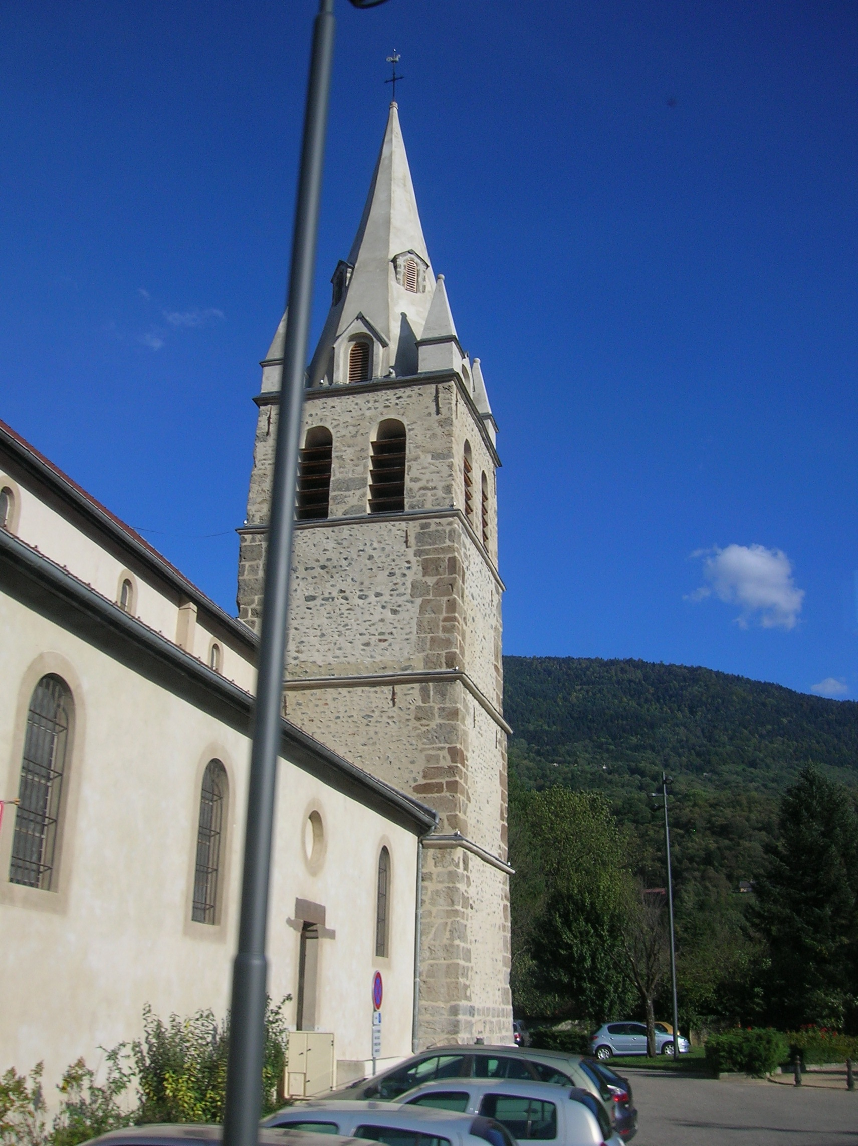 Eglise Saint-Jean à Vaulnaveys-le-Haut, Isère, France.